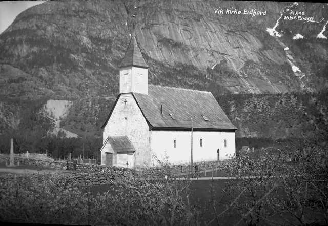 Eidfjord gamle kyrkje